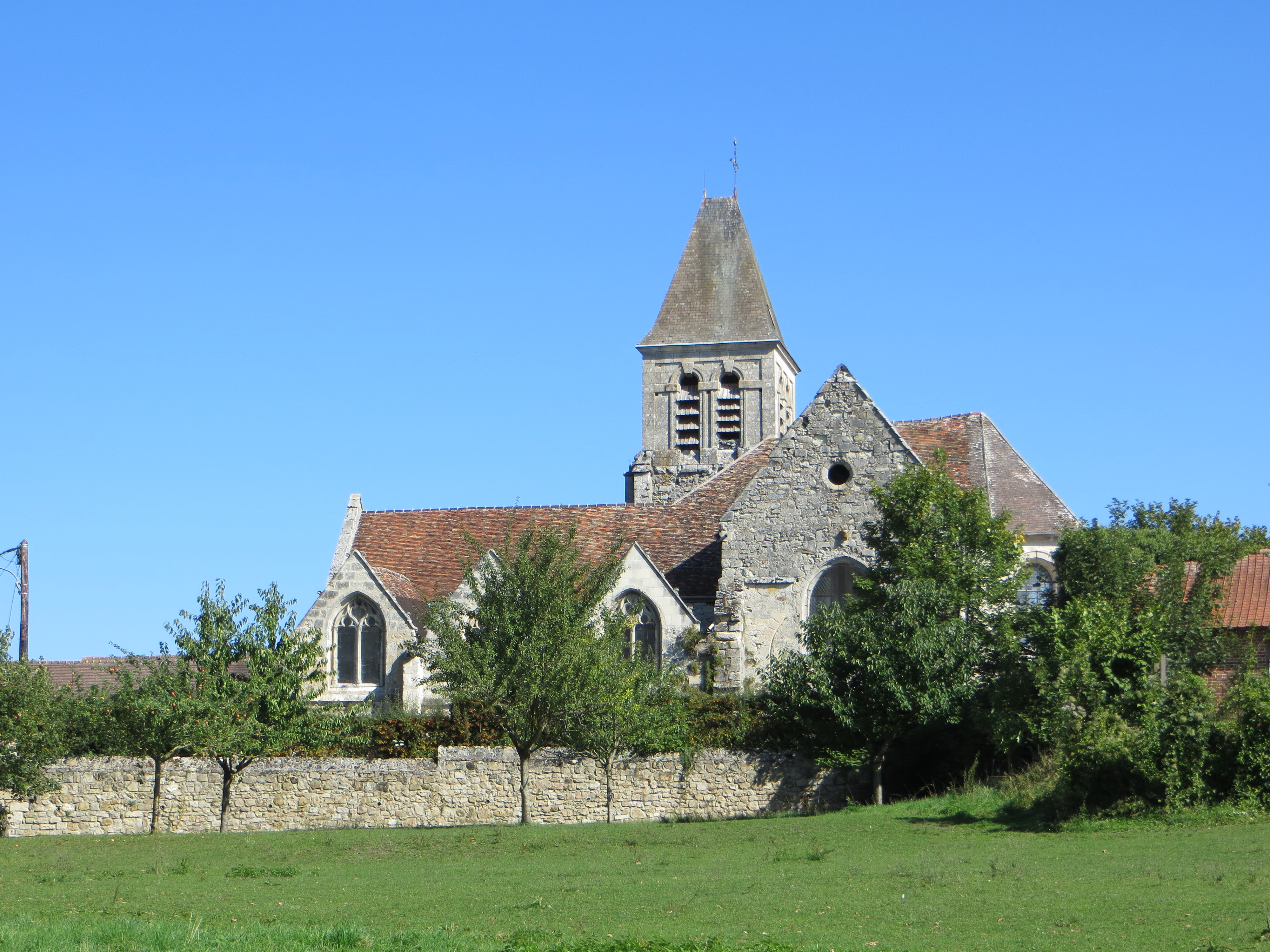 Vue générale de l'église